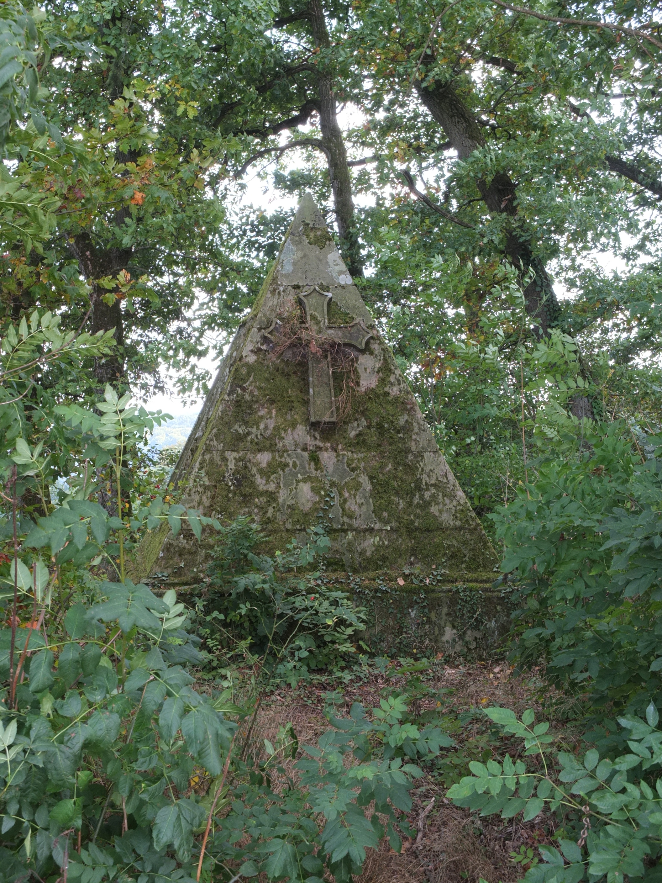 Grabpyramide von Franz Ludwig von Helmstatt († 1841) beim Finkenhof nahe Hochhausen/Kälbertshausen (siehe Beatrix Geßler-Löhr: Die Grabpyramide des Grafen Franz Ludwig von Helmstatt. In: Kraichgau. Beiträge zur Landschafts- und Heimatforschung, Folge 15/1997, S. 315−329, Hrsg. vom Heimatverein Kraichgau, Eppingen 1997, ISBN 3-921214-14-9)